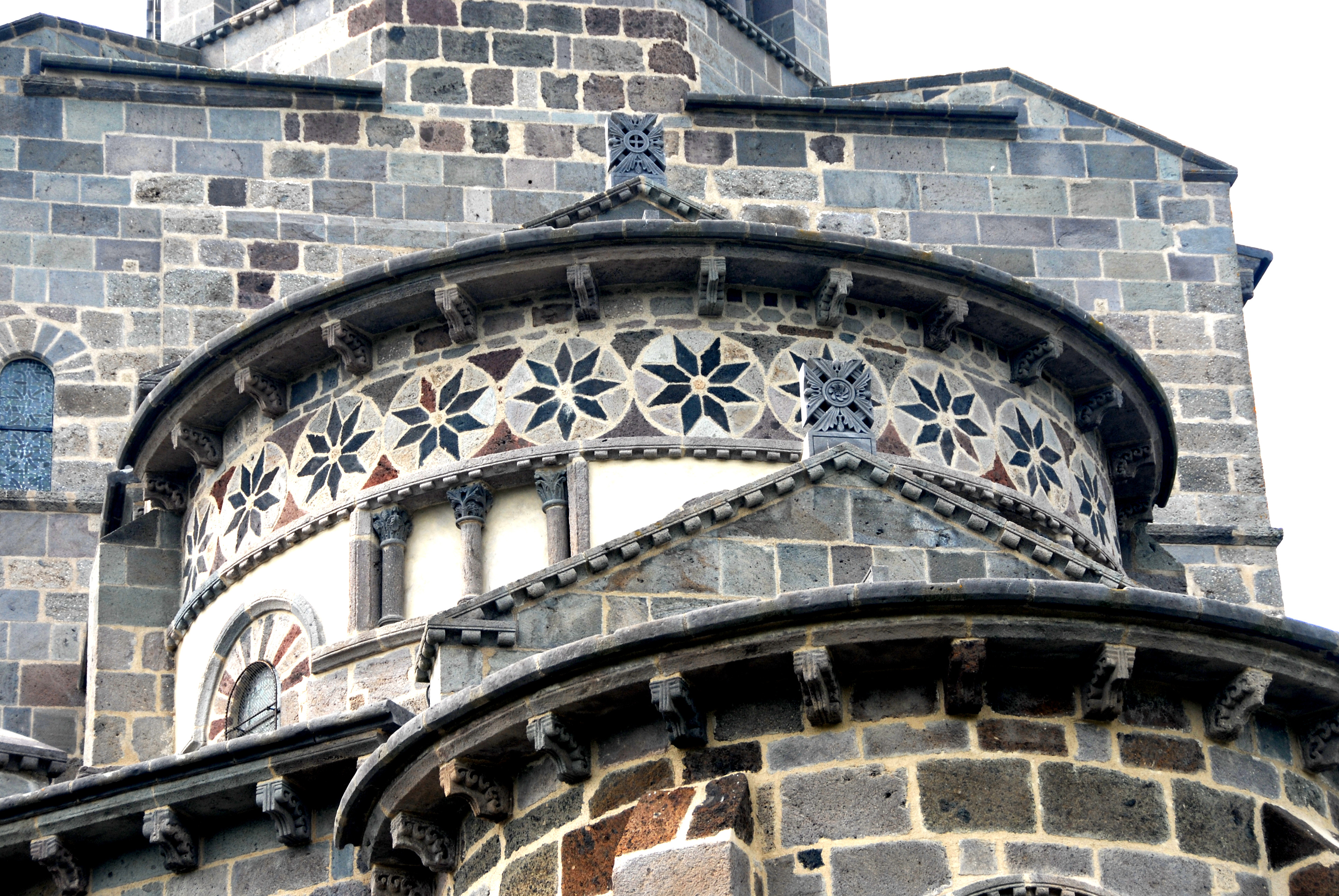 St.-Nectaire, Chorapsis und Kapellentraufe